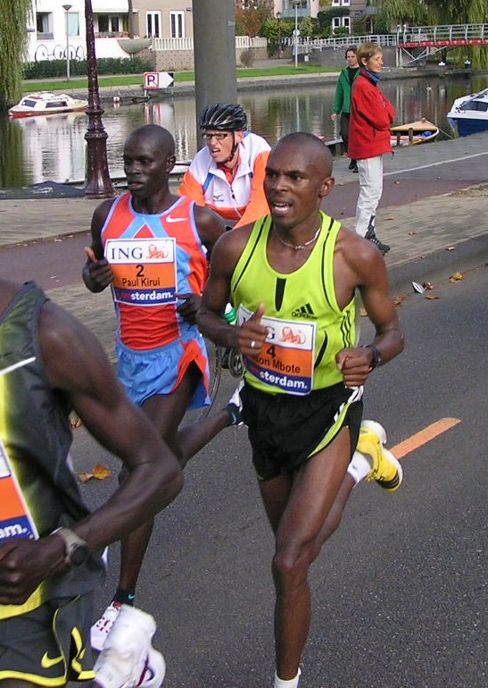 Jason Mbote (rechts) tijdens de marathon van Amsterdam in 2007, waar hij als zesde finishte. Links loopt Paul Kirui.